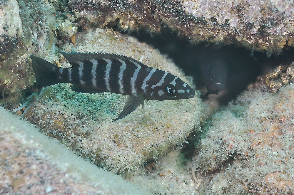 Neolamprologus cylindricus (île de Lupita-Ulwile).